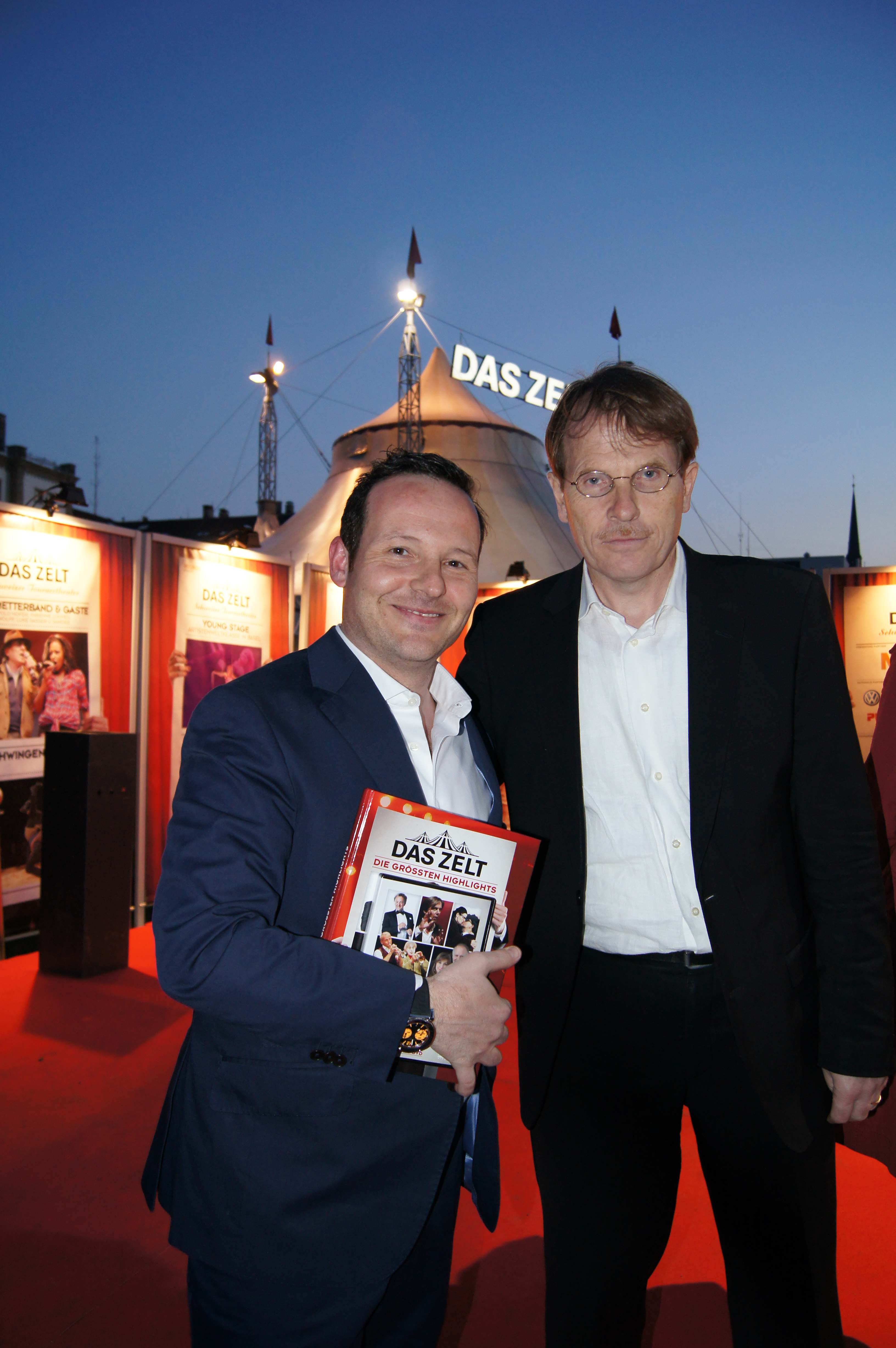 Am 22.03.2012 fand in Zürich die Buchpremiere zu "DAS ZELT - Die grössten Highlights" statt. Alle Infos zum Buch unter: Im Bild: Claudio Zuccolini, Lukas Heim